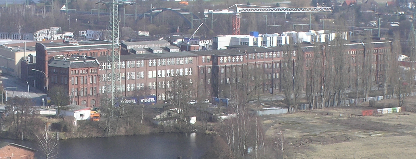 New-York Hamburger Gummi-Waaren Compagnie Werk Hamburg-Harburg. Sicht vom Dach des Channel Tower Harburg rechter Hintergrund: (Kran und weiße Gebäude) Neubau der Hamburg-Harburger Niederlassung der Heidelberger Druckmaschinen